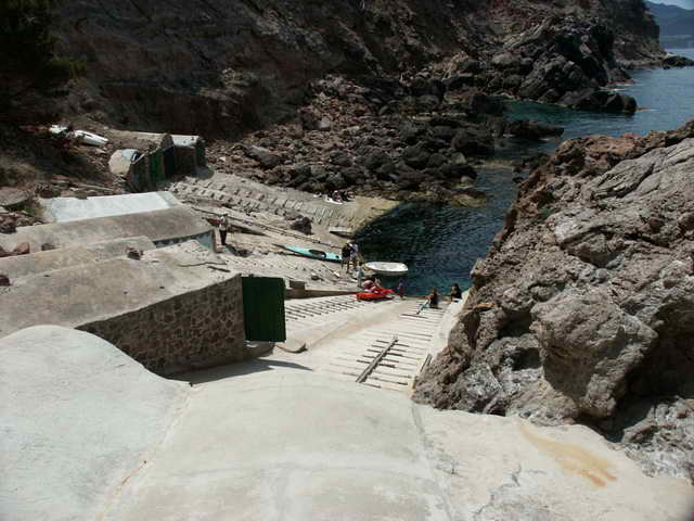 Port de s'Estaca. Valldemossa. Mallorca.